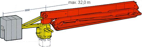 משאבה סטטית- מנוף. התמונה באדיבות Putzmeister . את האישור ניתן למצוא כאן.